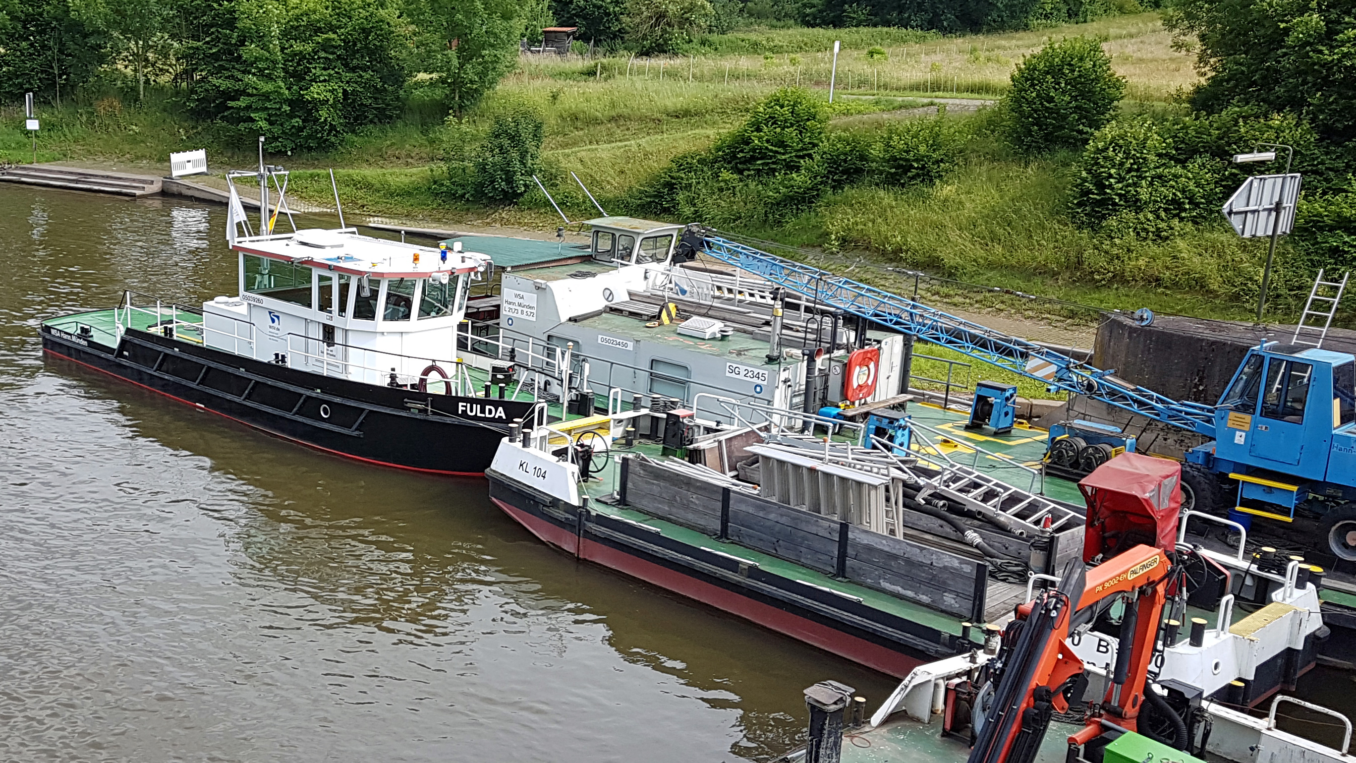 Das Arbeitsschiff Fulda (Typ Spatz, ENI 05039260) mit Verkehrssicherungsprahm an der Staustufe Bonaforth